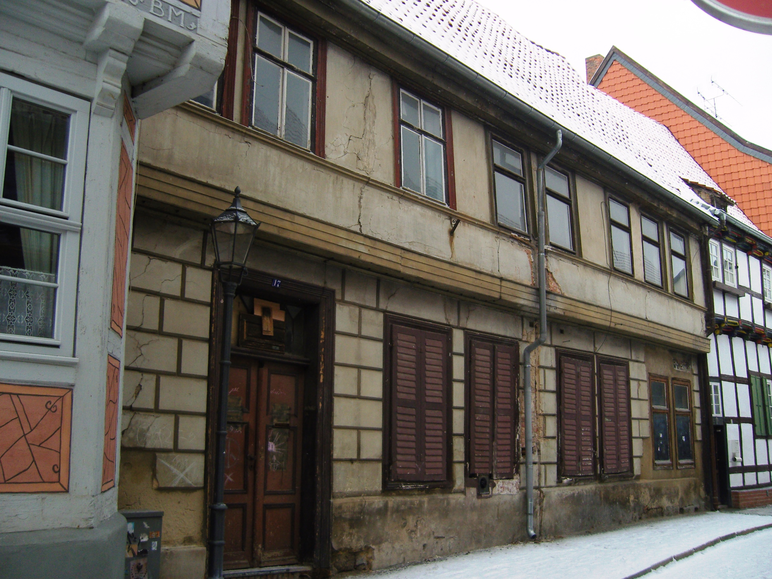 Denkmalgeschütztes Wohnhaus in der Straße Stieg 17 in Quedlinburg